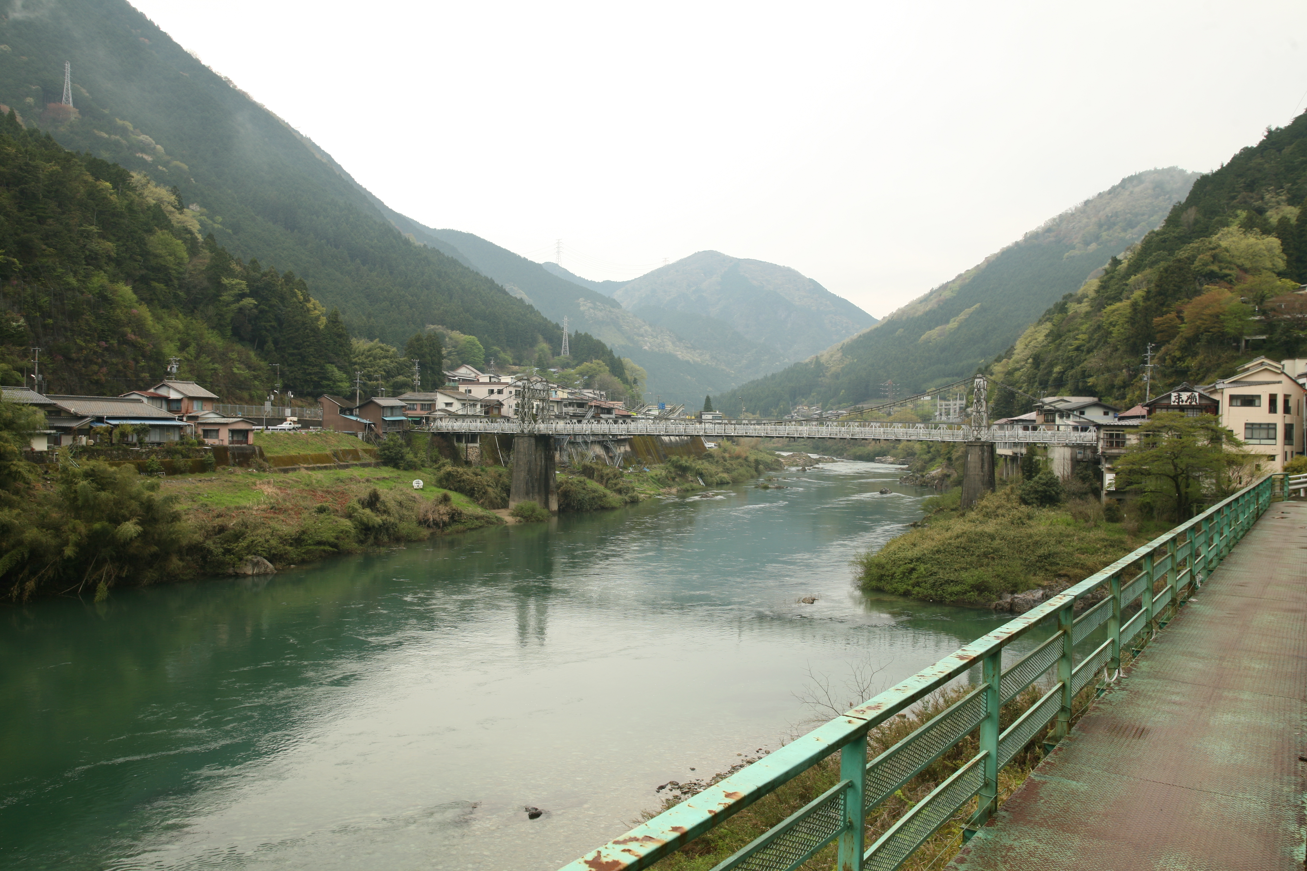 白川橋。岐阜県白川町にある、飛騨川にかかる橋。